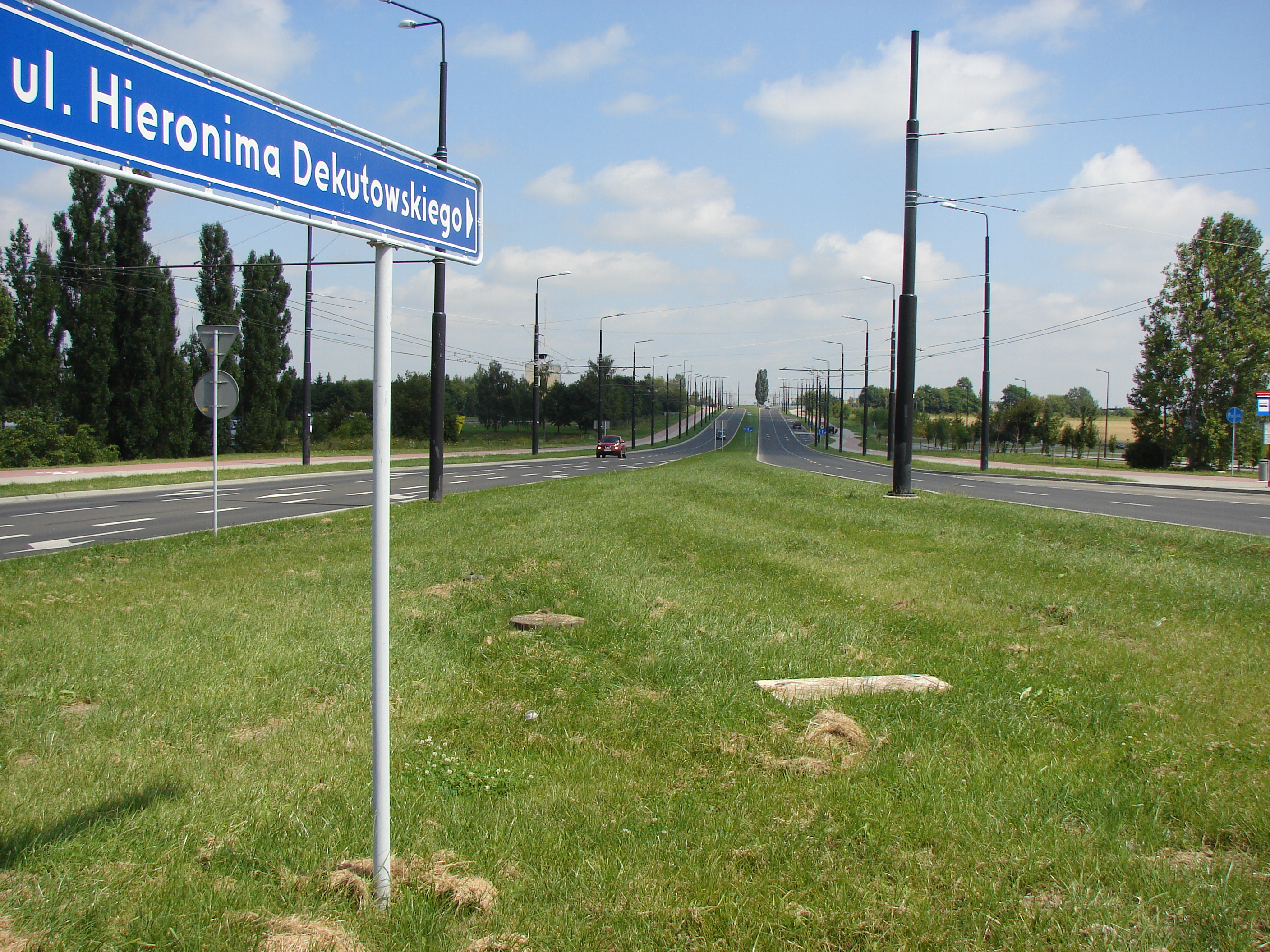 Ulica Hieronima Dekutowskiego w Lublinie